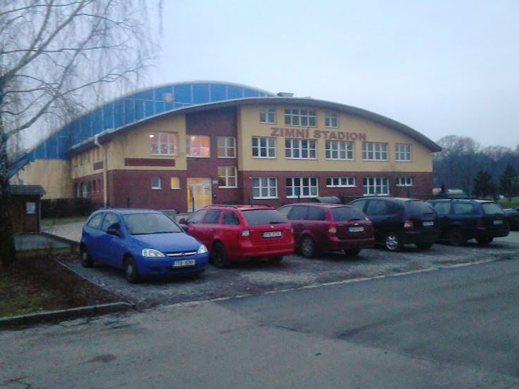 Bospor Aréna